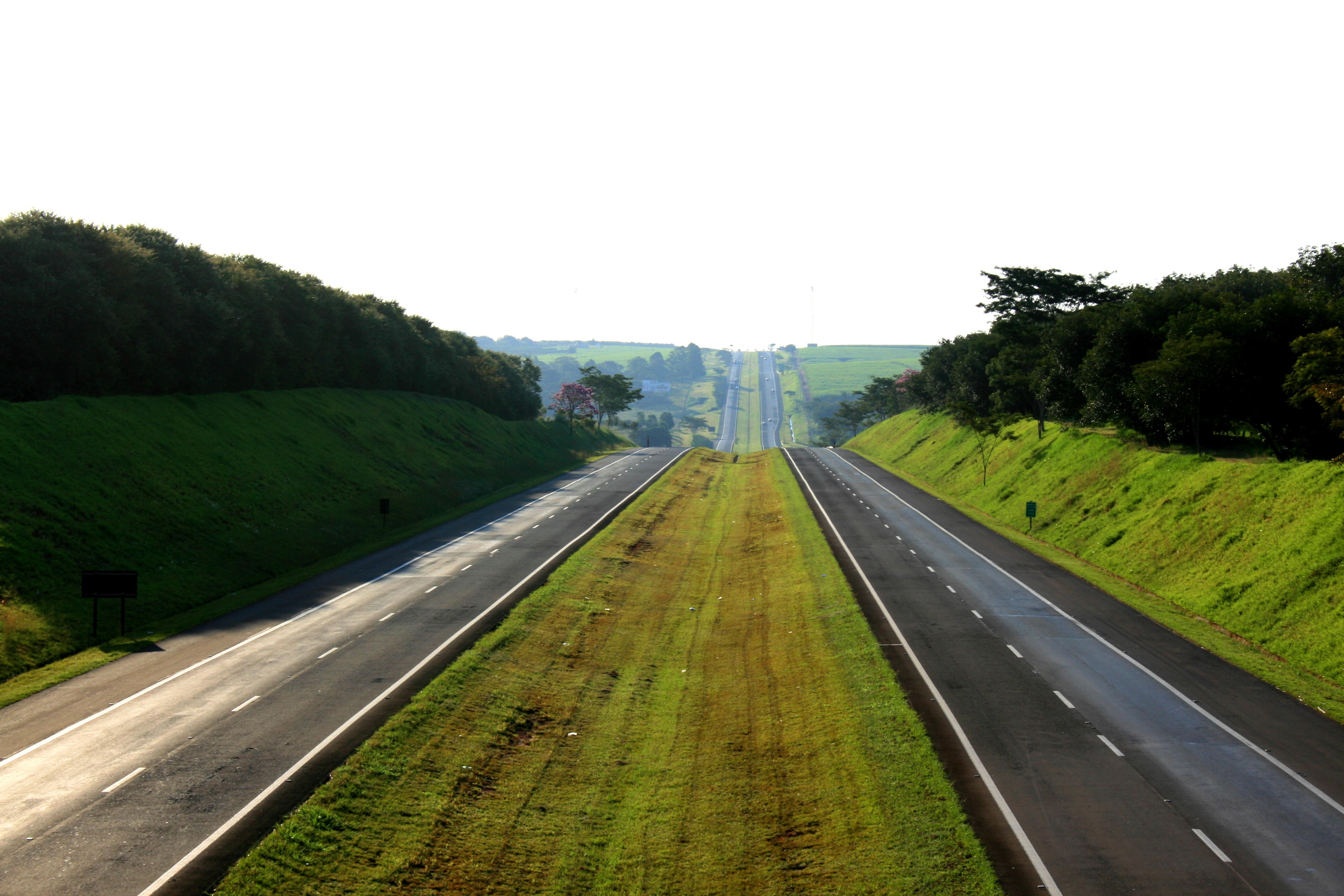 Trecho da Rodovia Washington Luis.